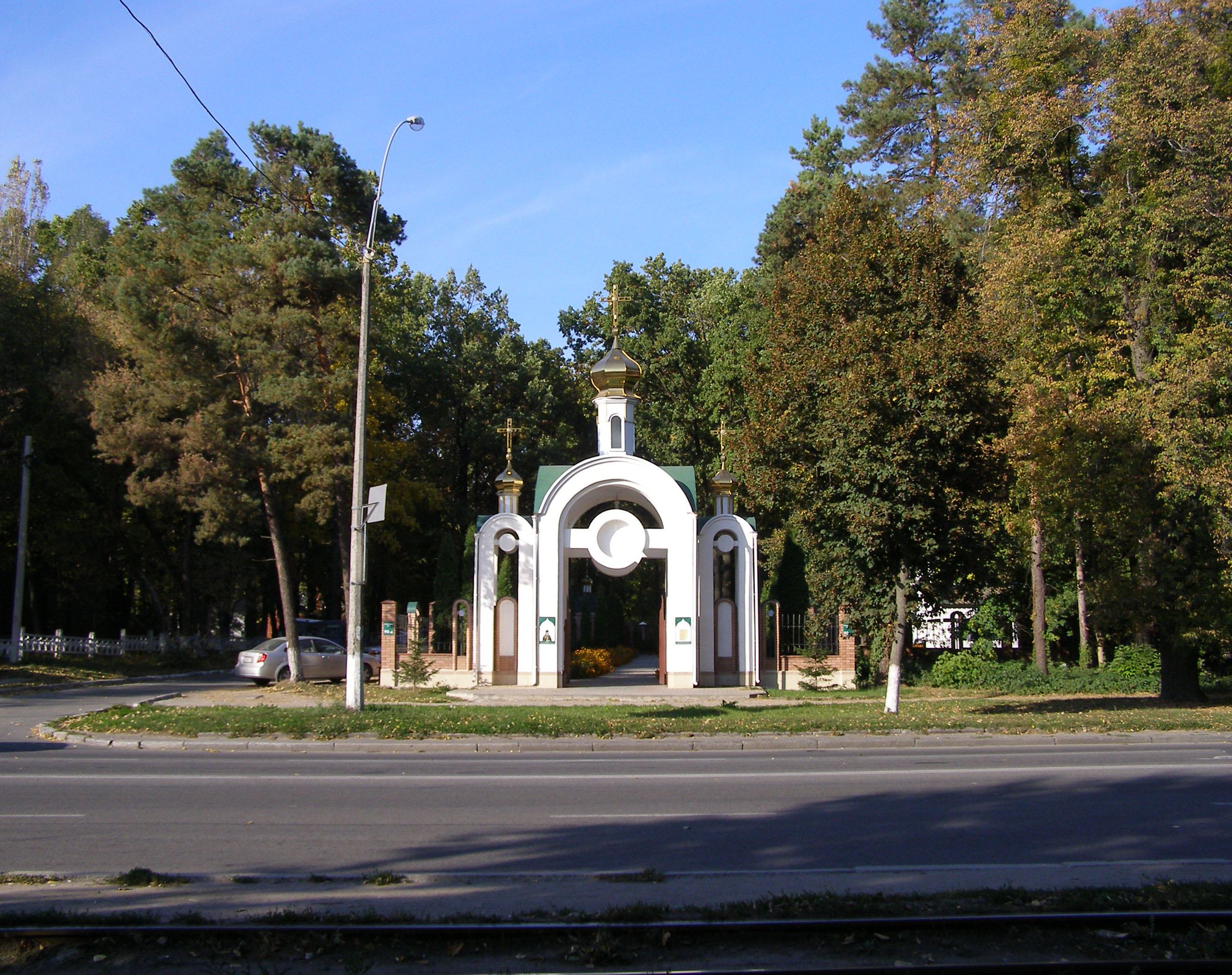 Вінниця, Хмельницьке шосе, 90а. Храм святителя Луки Кримського